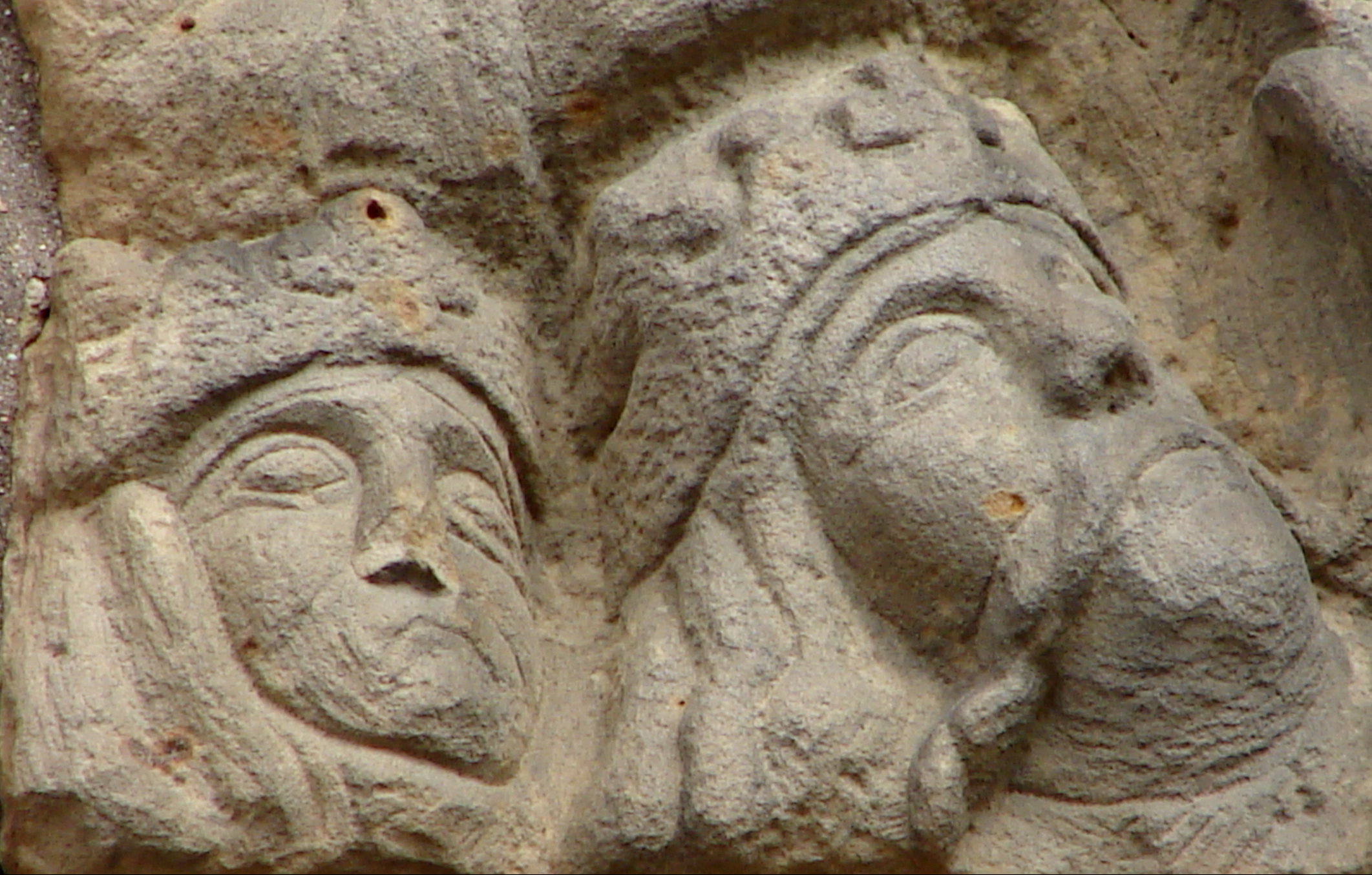 Formentlig kong Valdemar II og hans anden kone Berengaria af Portugal, detalje fra sydportals gavlrelief, Ribe Domkirke, Jylland